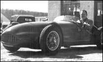 Bandini 750 sport siluro